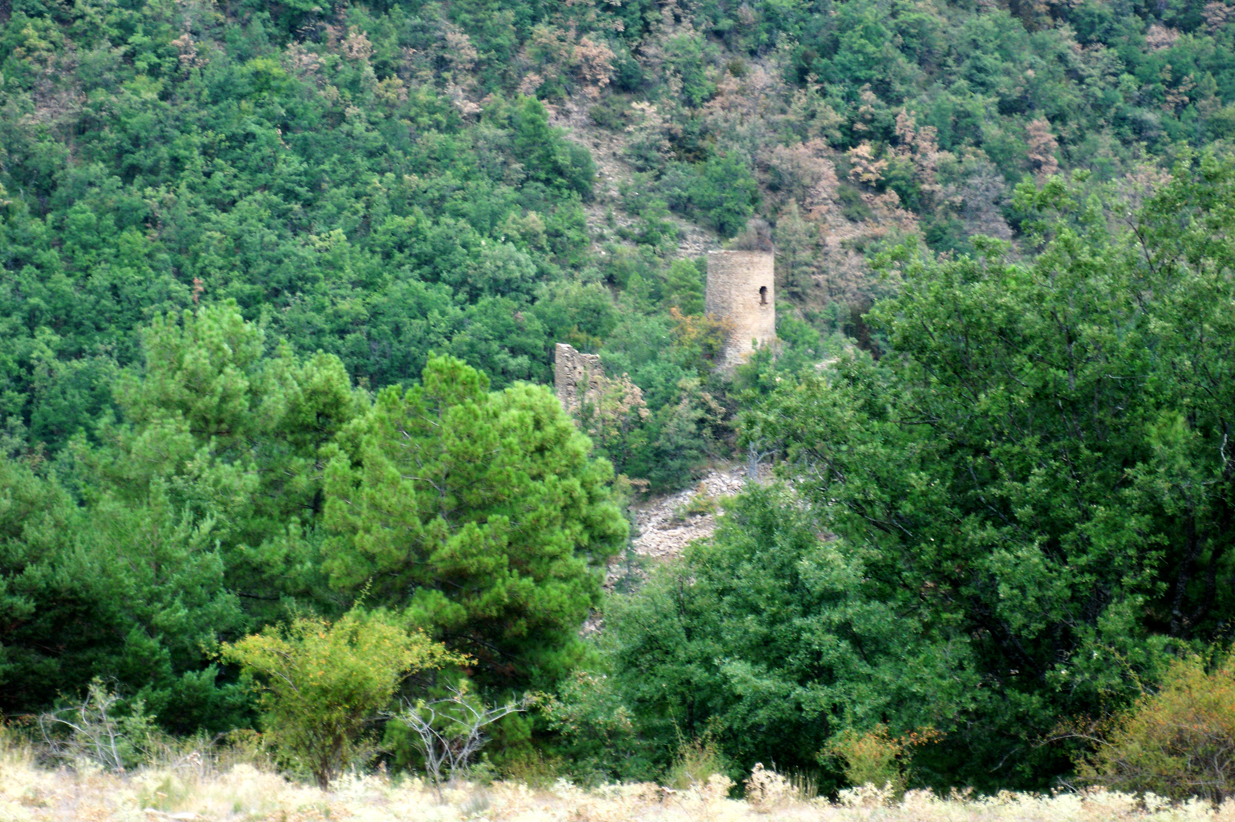 Vista de del Castell de Valldarques des de l'indret de Santa María de Remolins on hi destaca la torre circular, únic element del conjunt que es conserva dret.